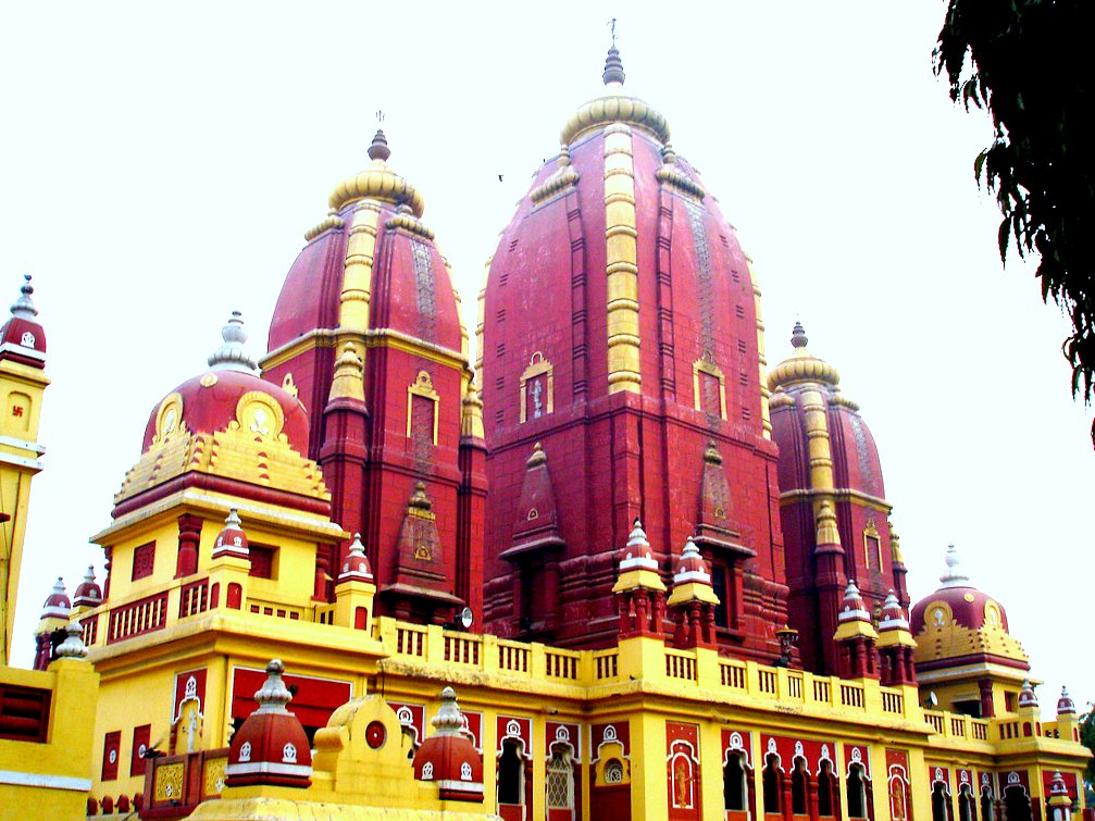 Birla Mandir, or Laxmi Narayan Temple, Delhi